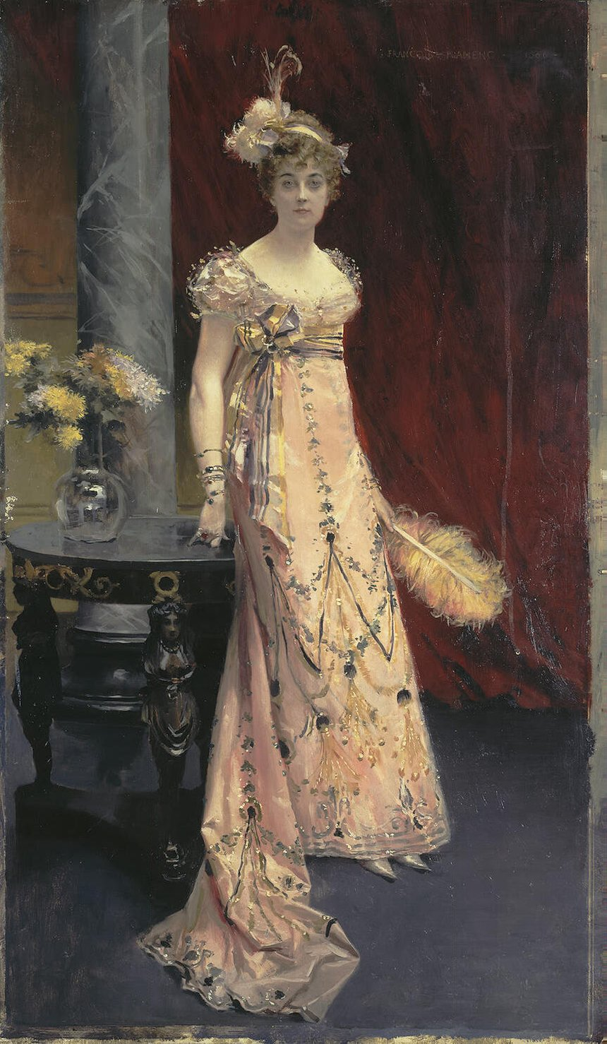 графиня Дарья Евгеньевна Богарнэ, во втором браке Кочубей